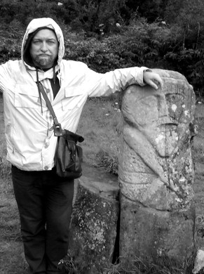 Foto tirada do autor pelo utilizador.